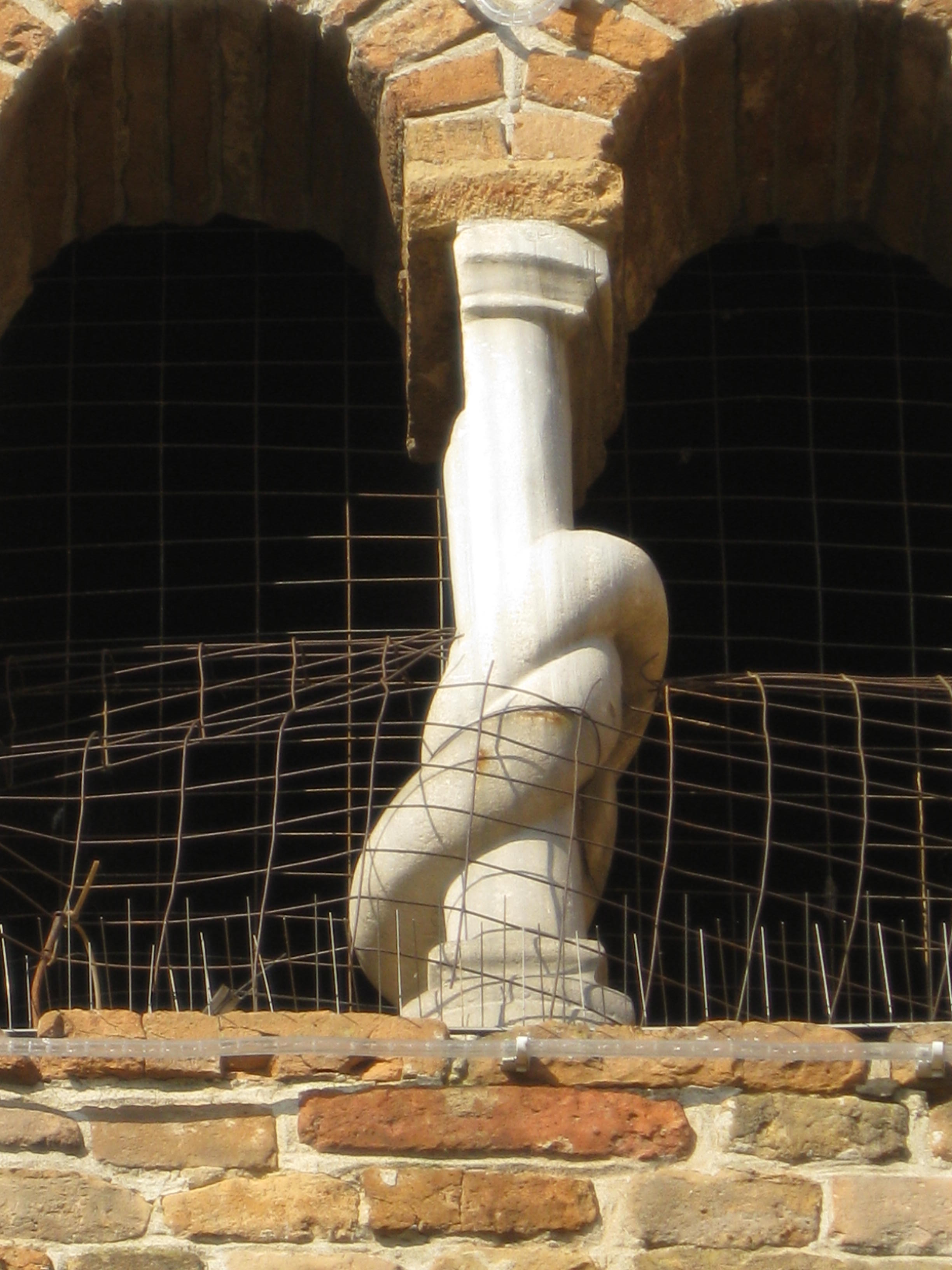 Particolare della colonna presente nella bifora del campanile della pieve di Santa Maria a New York